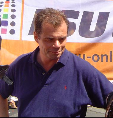 Friedbert Pflüger